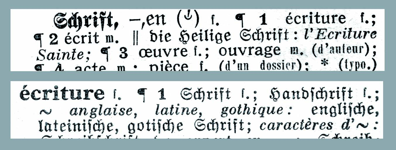 Exemple de Zweischriftigkeit : double écriture Fraktur pour l'allemand et Antiqua pour les autres langues. Dictionnaire bilingue allemand-français de 1960, 1e édition 1953